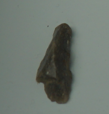 objets du néolithique et du chalcolithique au musée de Toul.